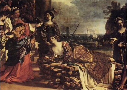 La morte di Didone (1631) - Giovanni Francesco Barbieri detto il Guercino Galleria Borghese, Roma